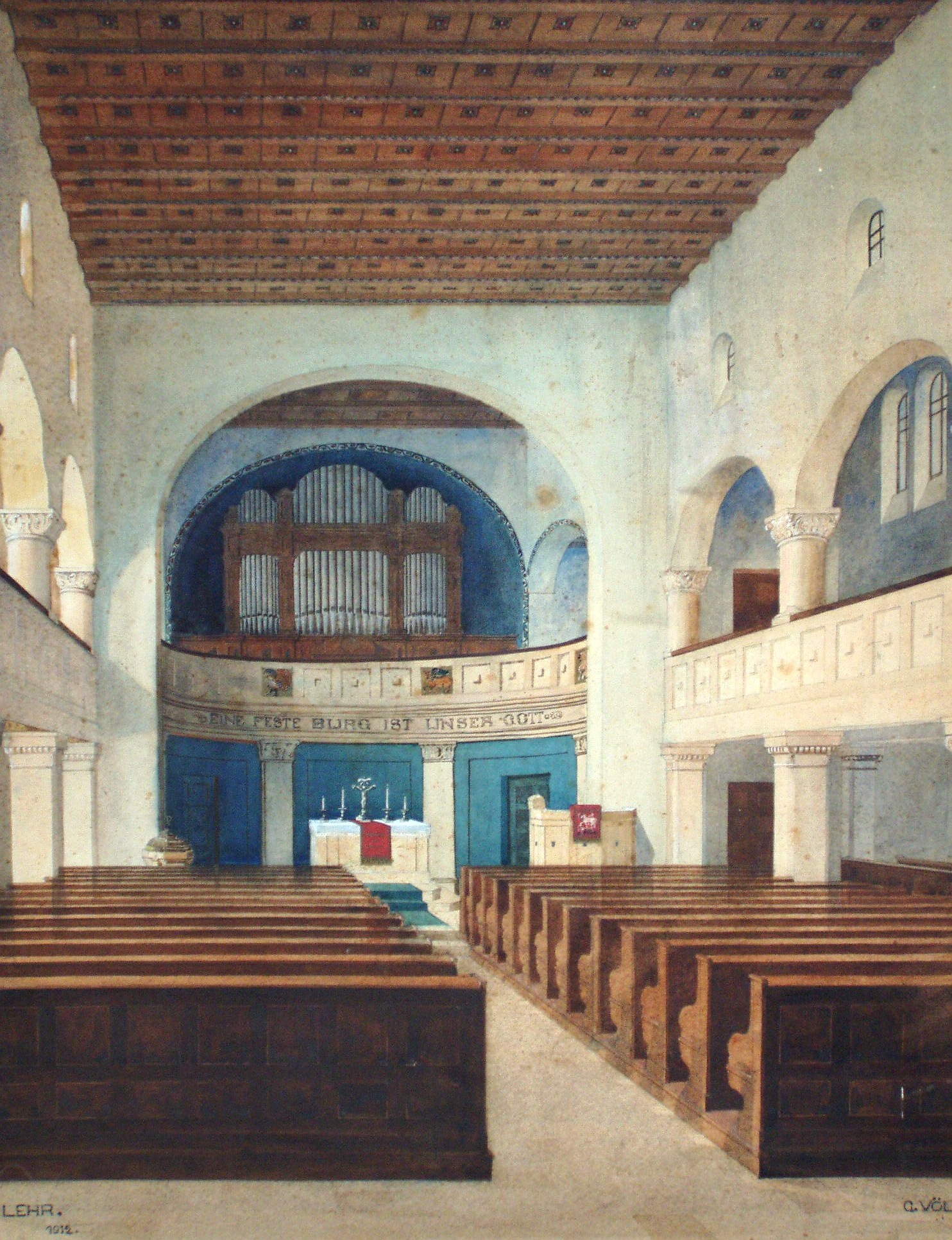 Innenraum der Kirche St. Paul (Nürnberg), Entwurf von Albert Lehr